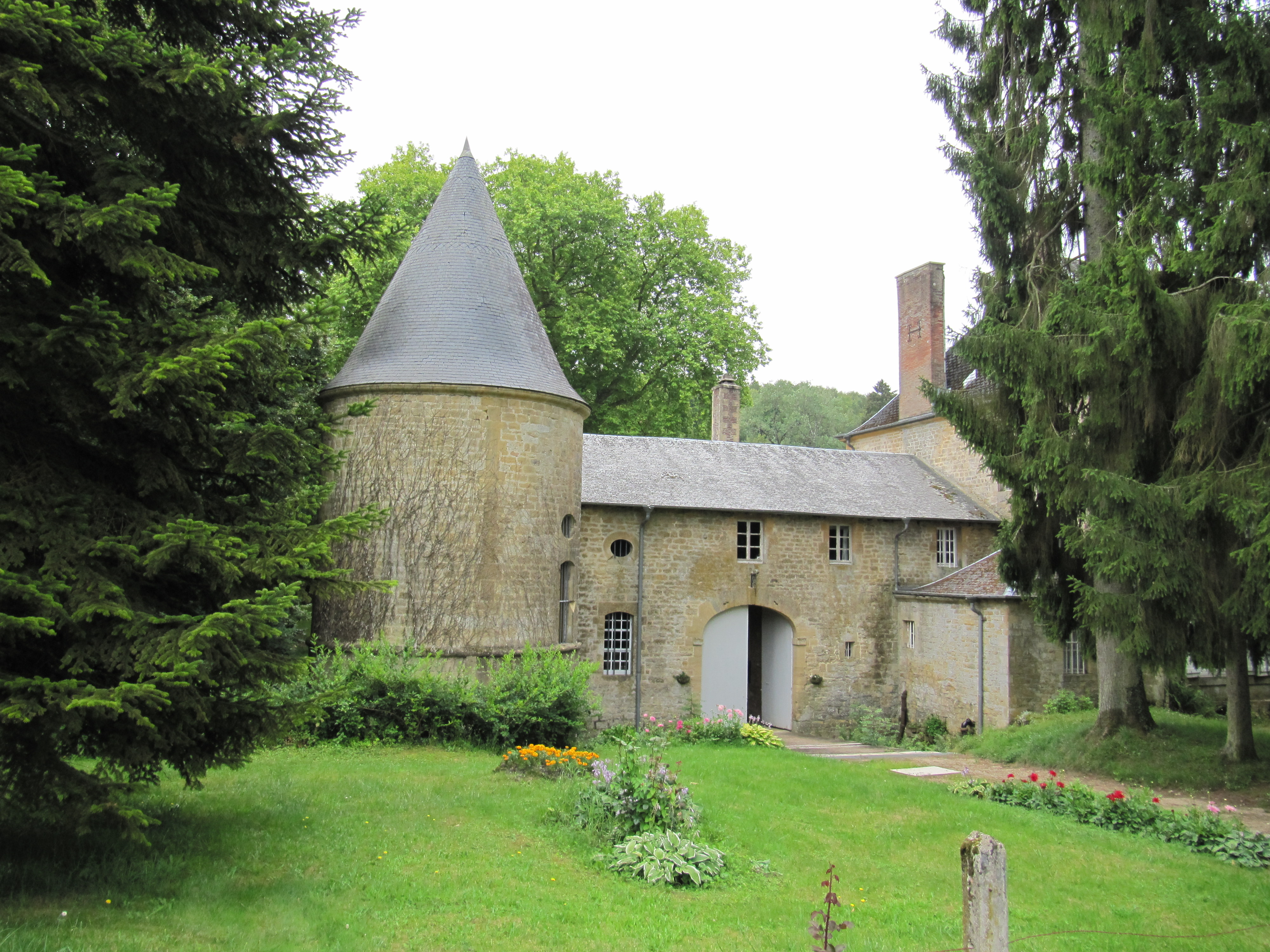 Château de Gruyères vue de la rue principale du village - façade Ouest 2 - Gruyères Ardennes France